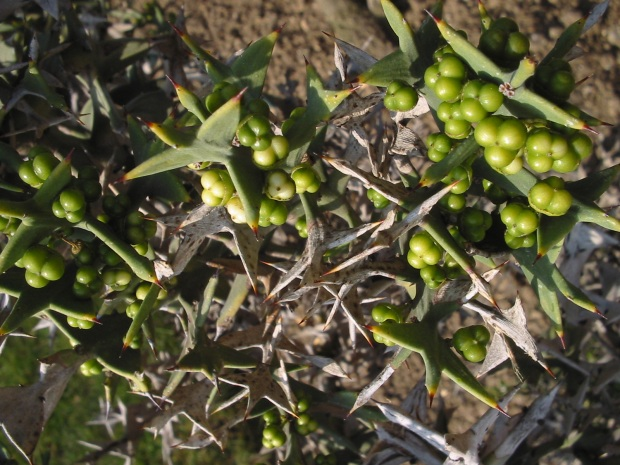 Colletia paradoxa, Jardin des Plantes de Paris